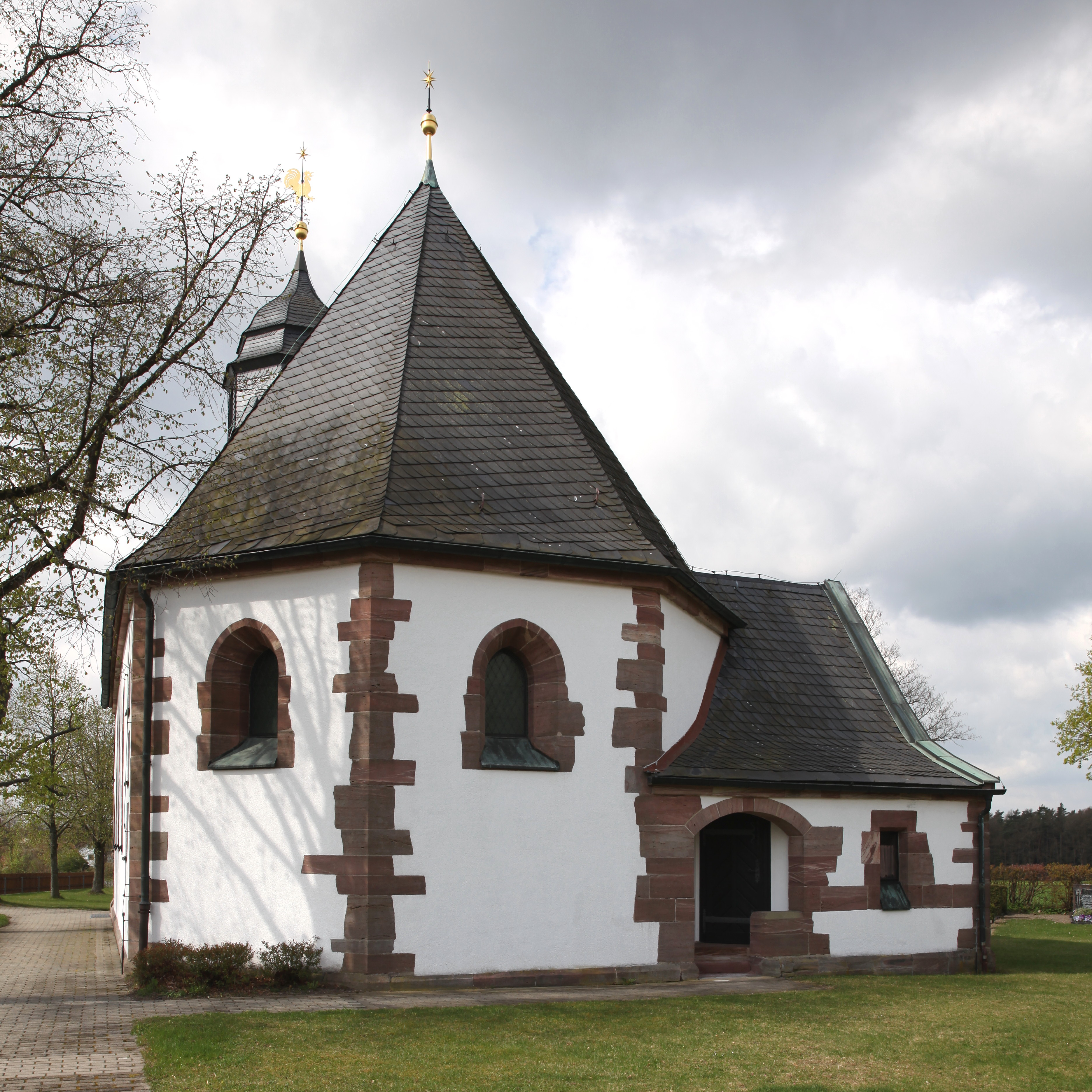 Bergkirche in Höhn, Landkreis Coburg